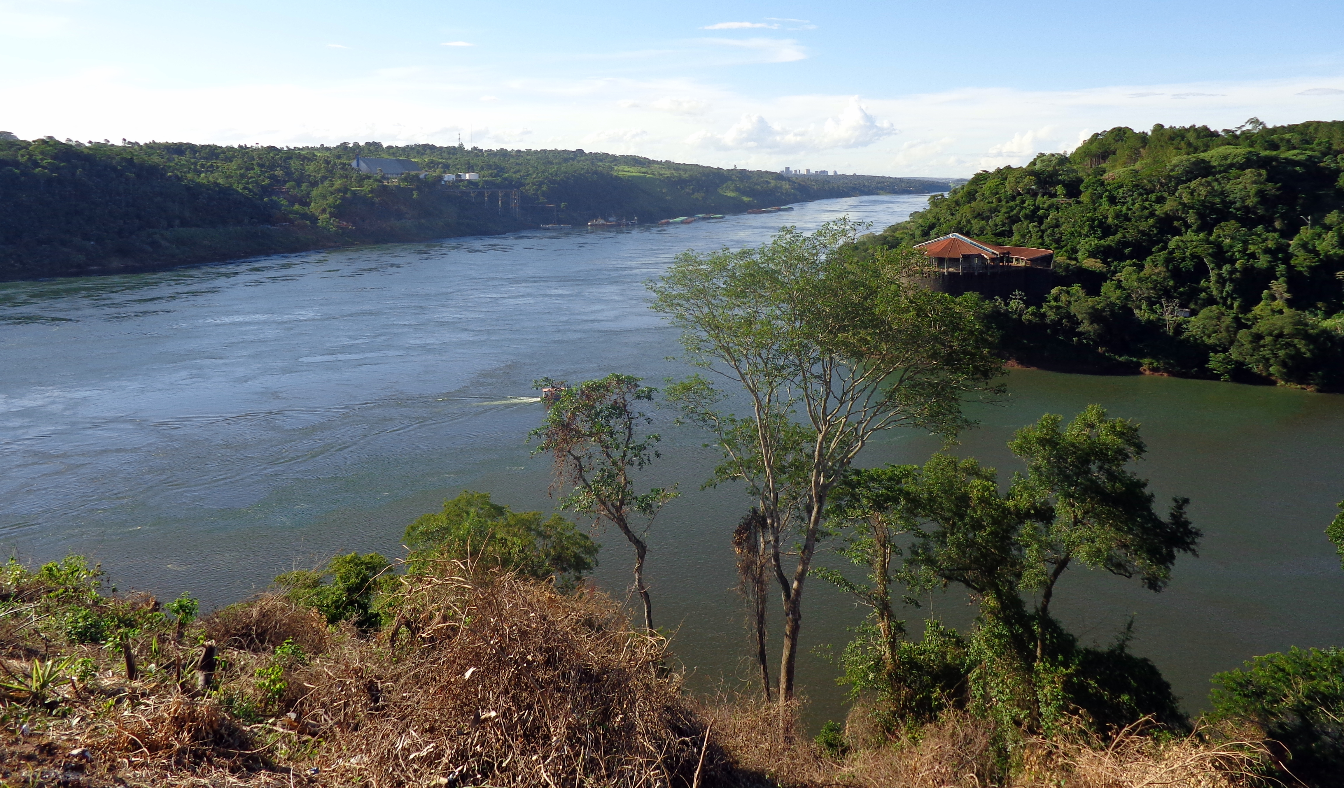 Cerca del Hito Tres Fronteras, en Puerto Iguazú, Misiones, Argentina